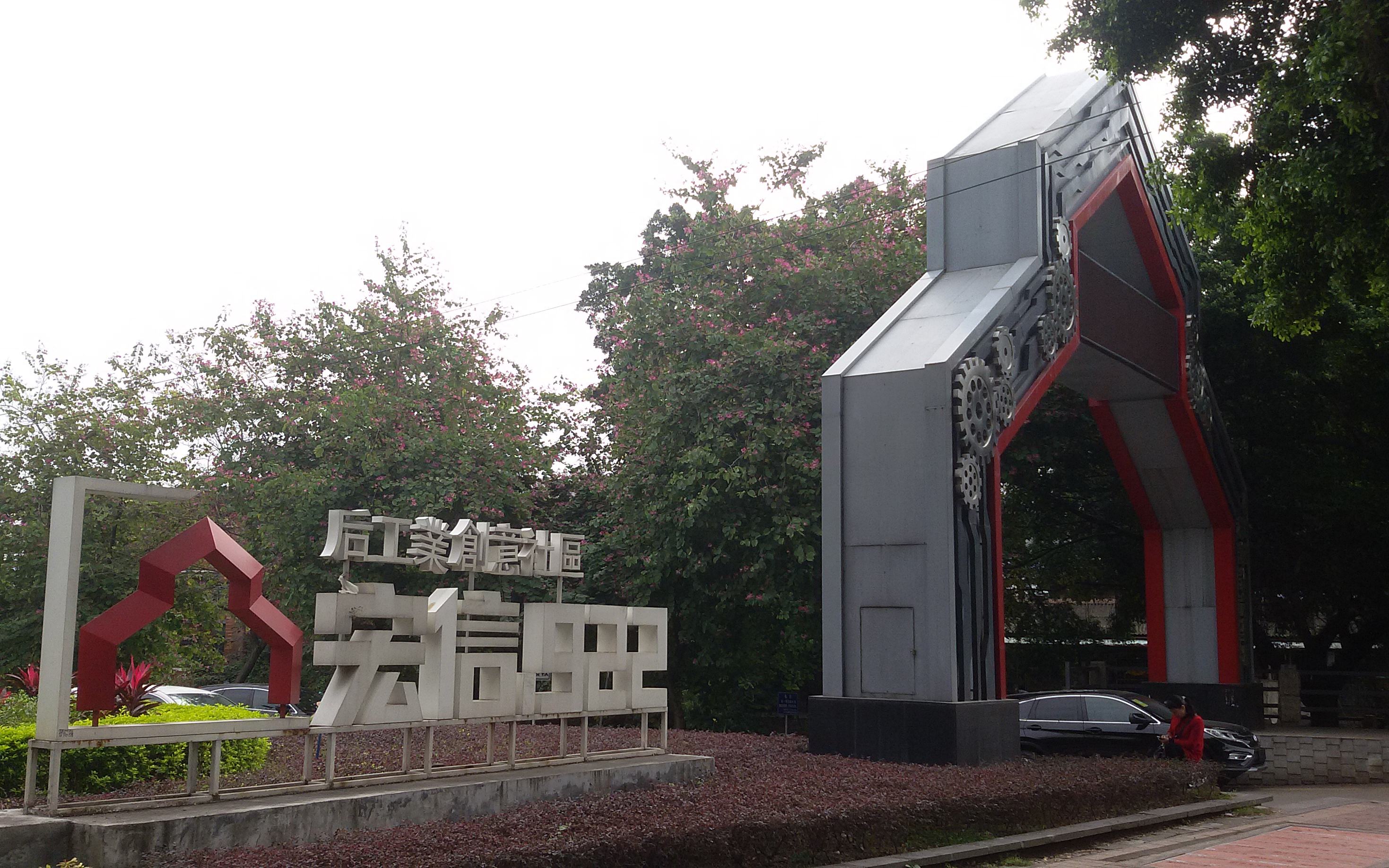 粵語: 宏信922创意园正门